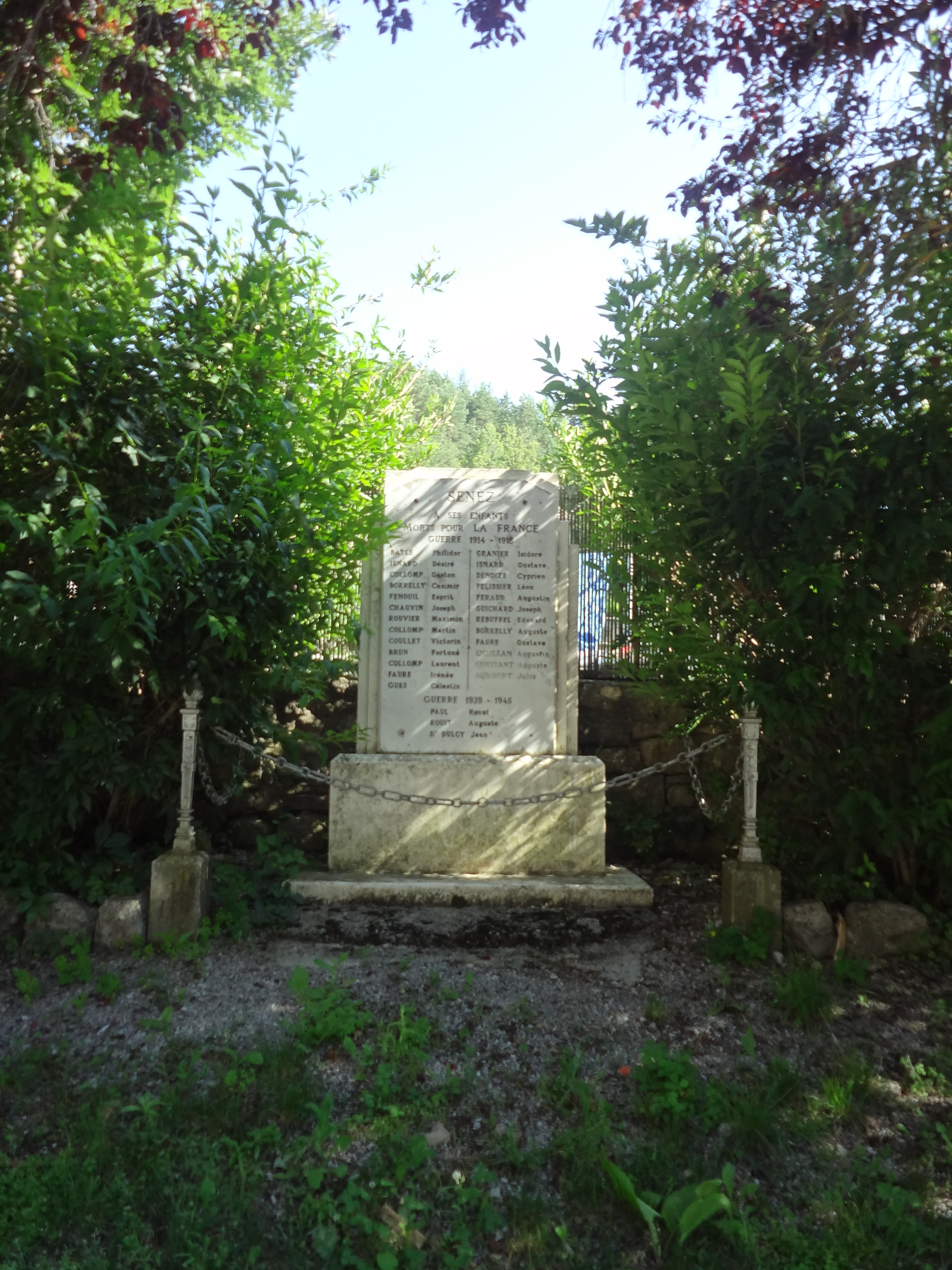 Téléchargée avec Commonist 0.9.1 Monument aux morts de Senez